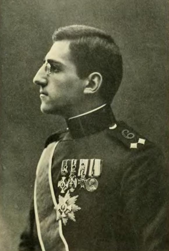 Alejandro de Yugoslavia como príncipe heredero de Serbia.